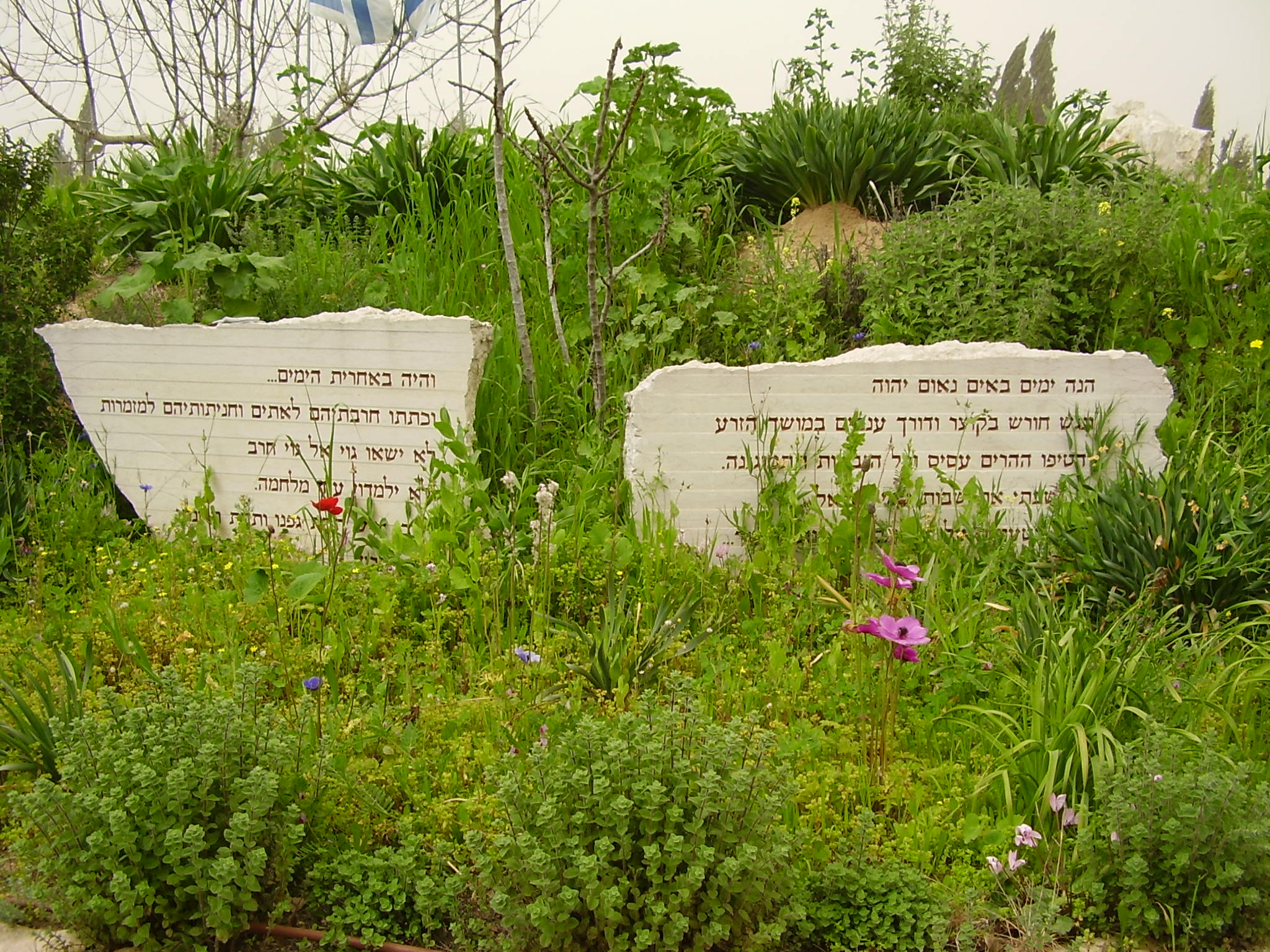 גבעת תום ותומר